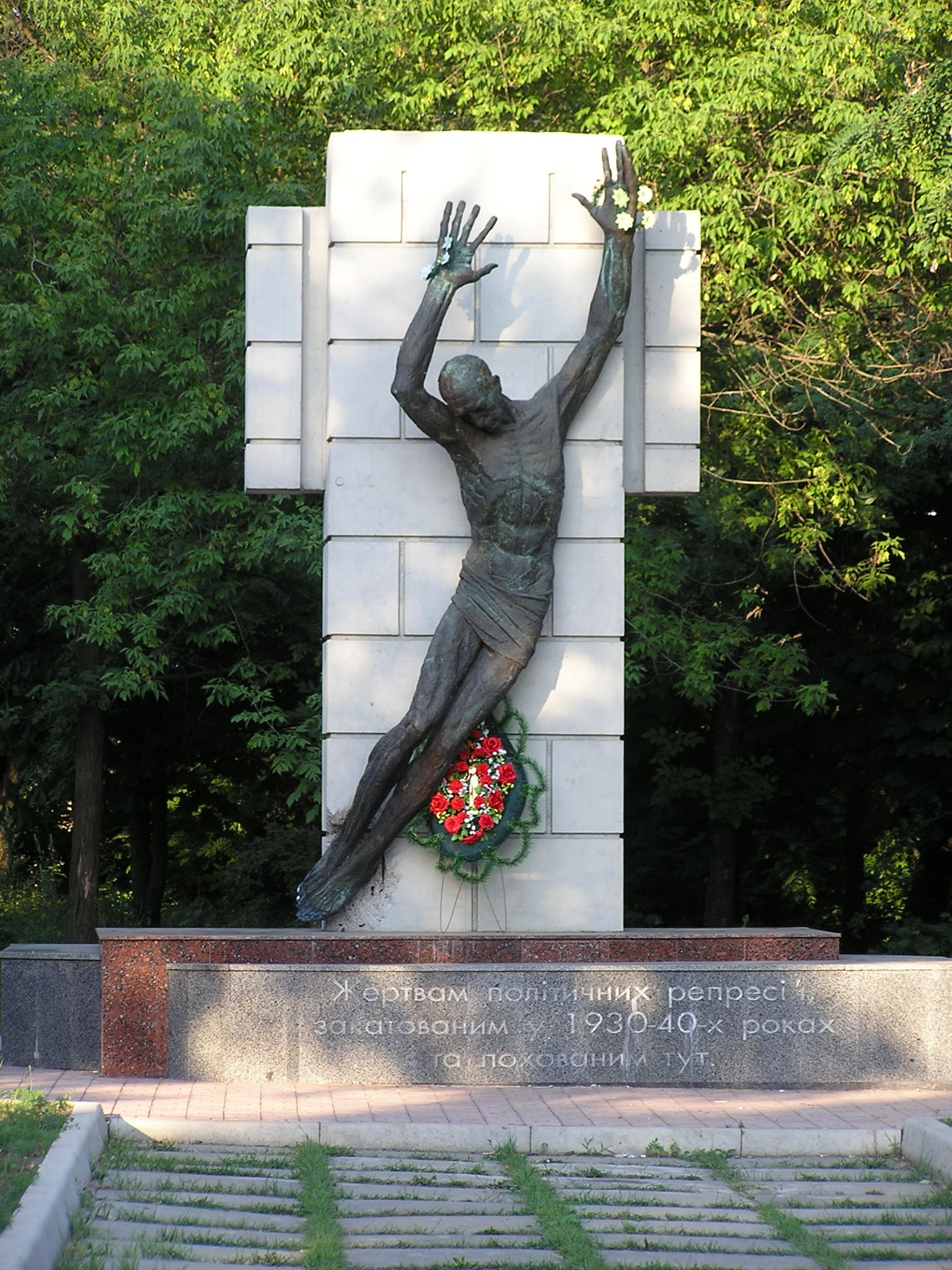 Кировский район Донецка